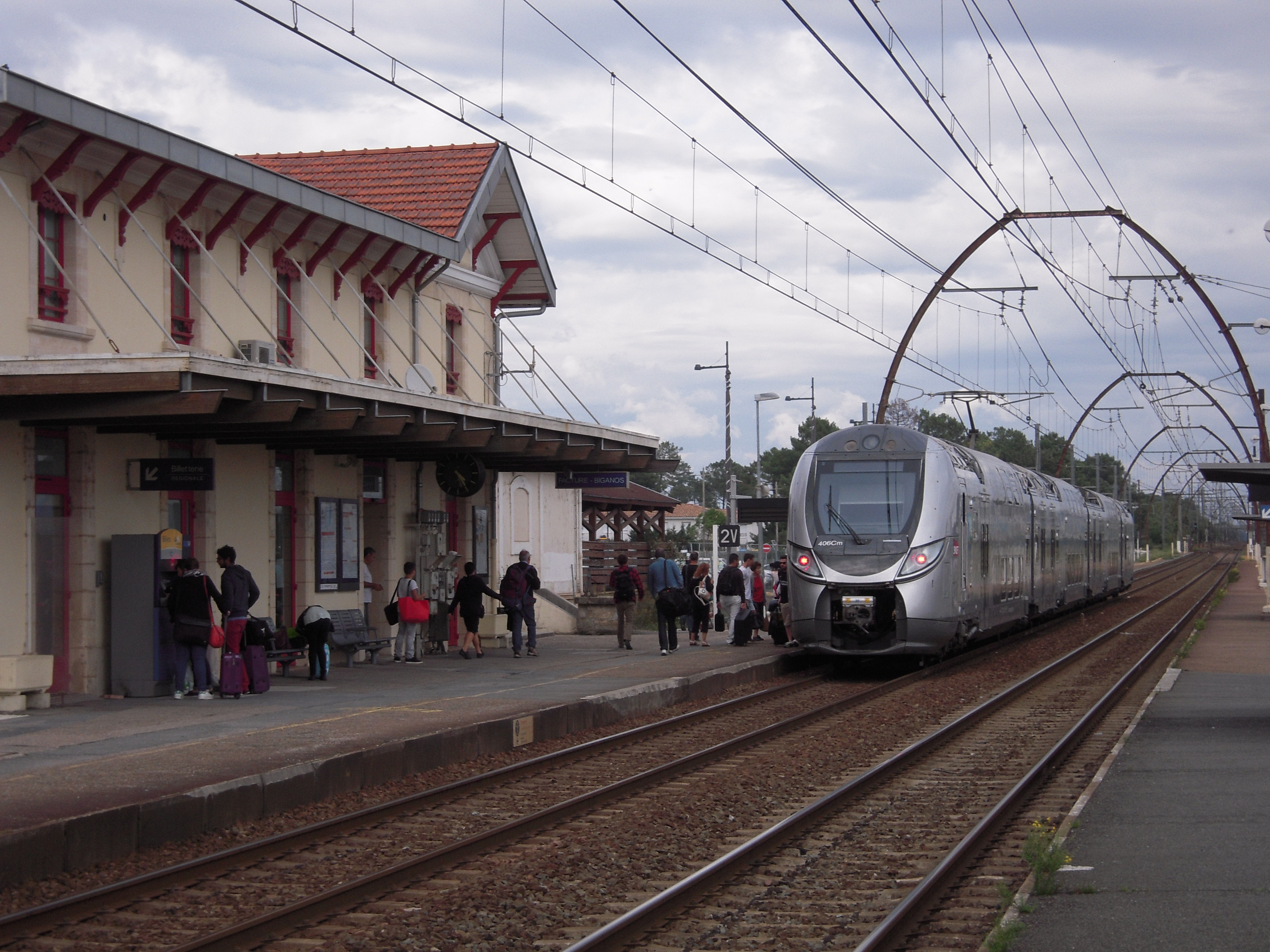 Le record de vitesse sur rail du 28 mars 1955 par la SNCF (320,6 km/h), s'est déroulé entre les gares de Facture-Biganos et Morcenx, avec la locomotive électrique CC 7107.